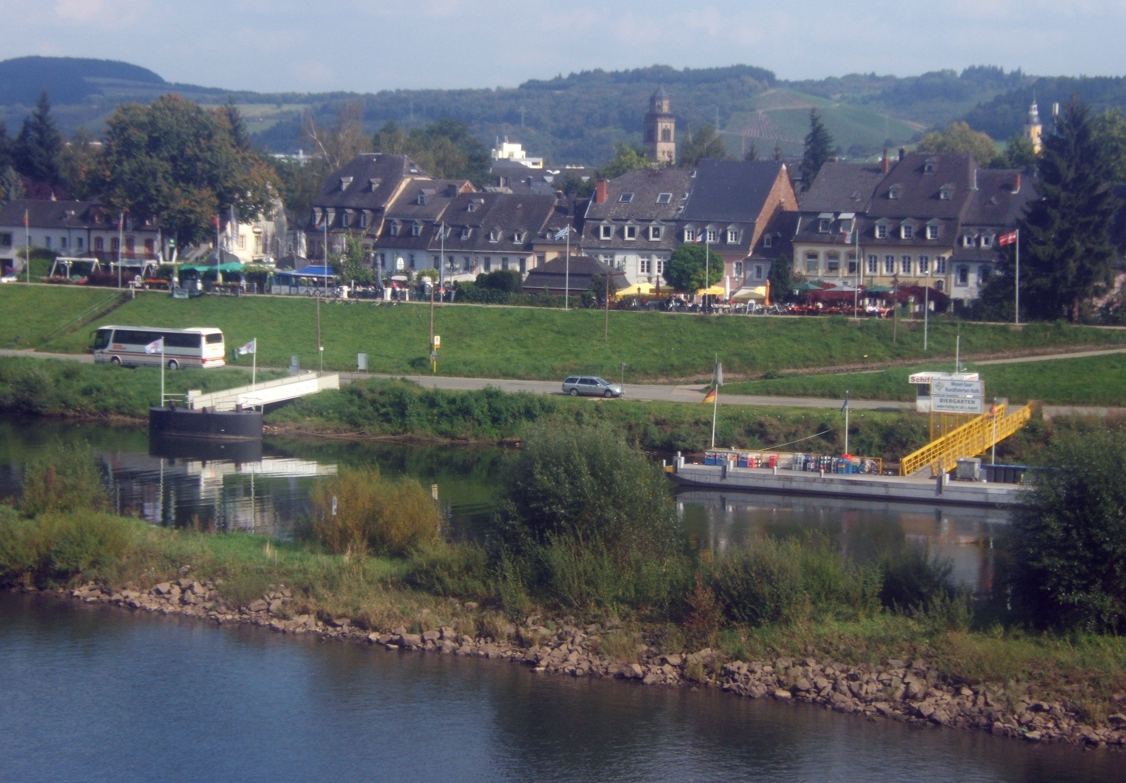 Zurlaubener Ufer, Trier